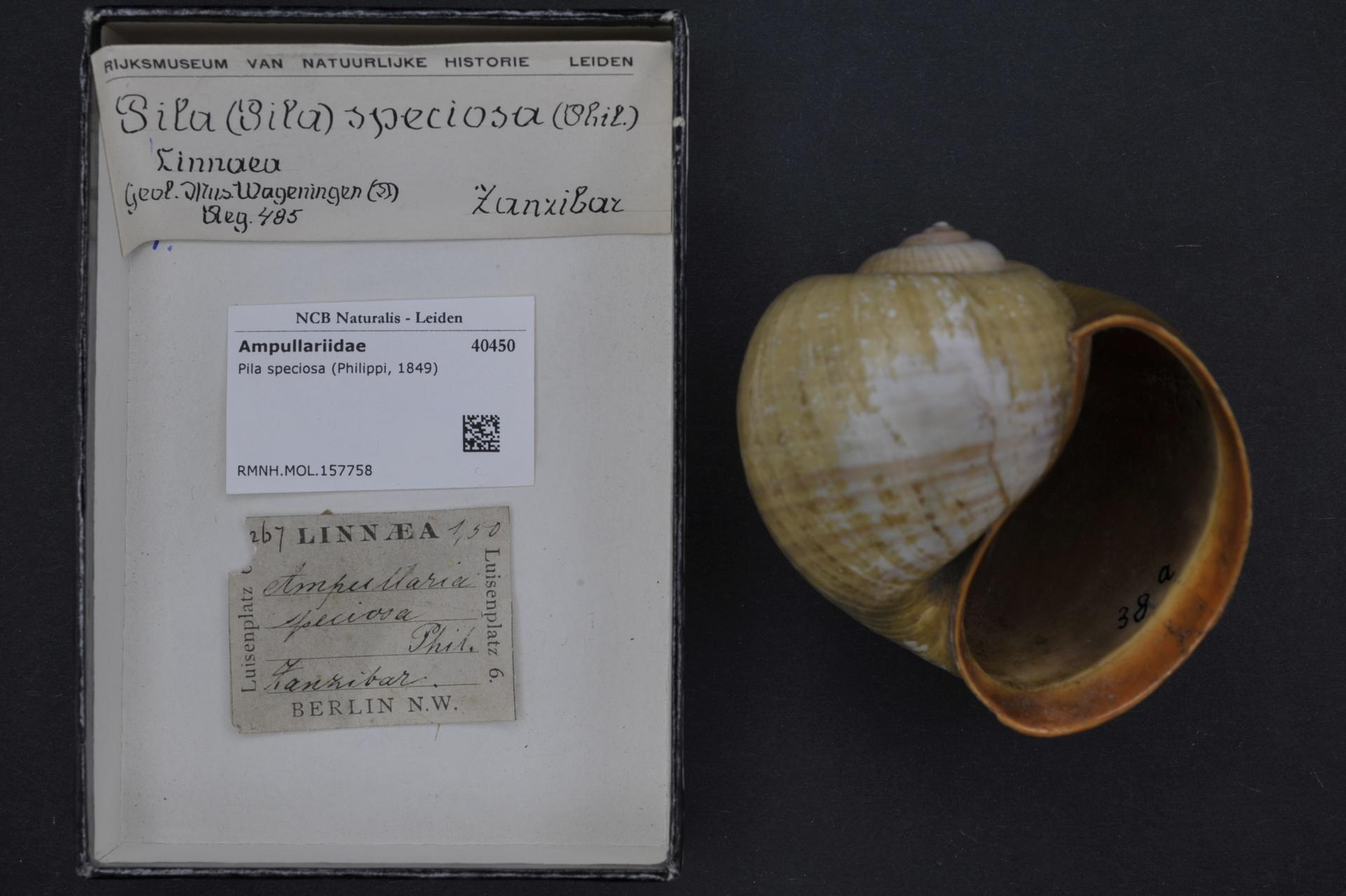 Pila speciosa (Philippi, 1849)